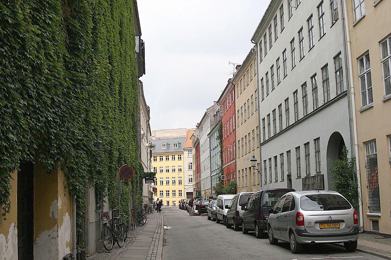 Peder Hvitfeldts Stræde in Copenhagen, Denmark